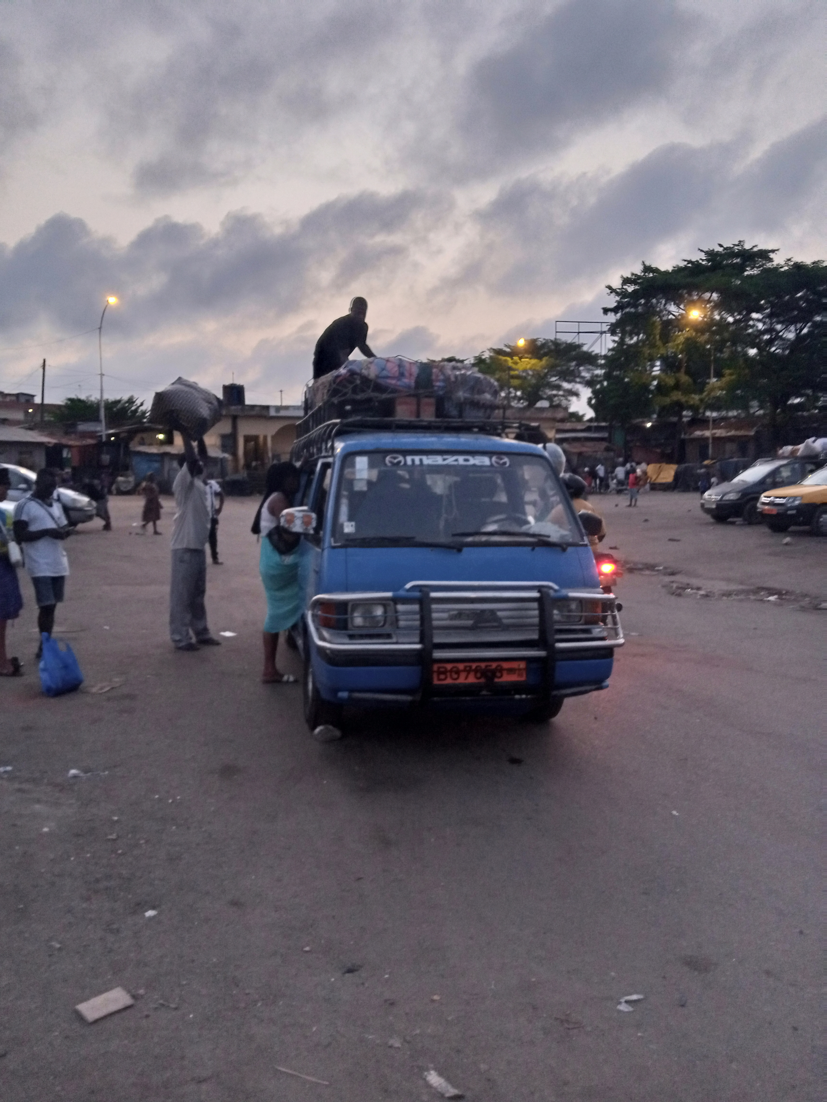 le parc de Tokpa This is an image with the theme "Africa on the Move or Transport" from: Benin